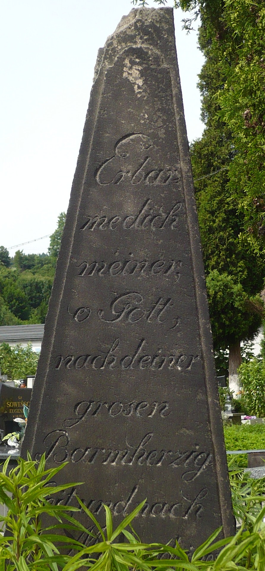 Nowa Ruda, ul. Cmentarna - cmentarz komunalny (pomnik)